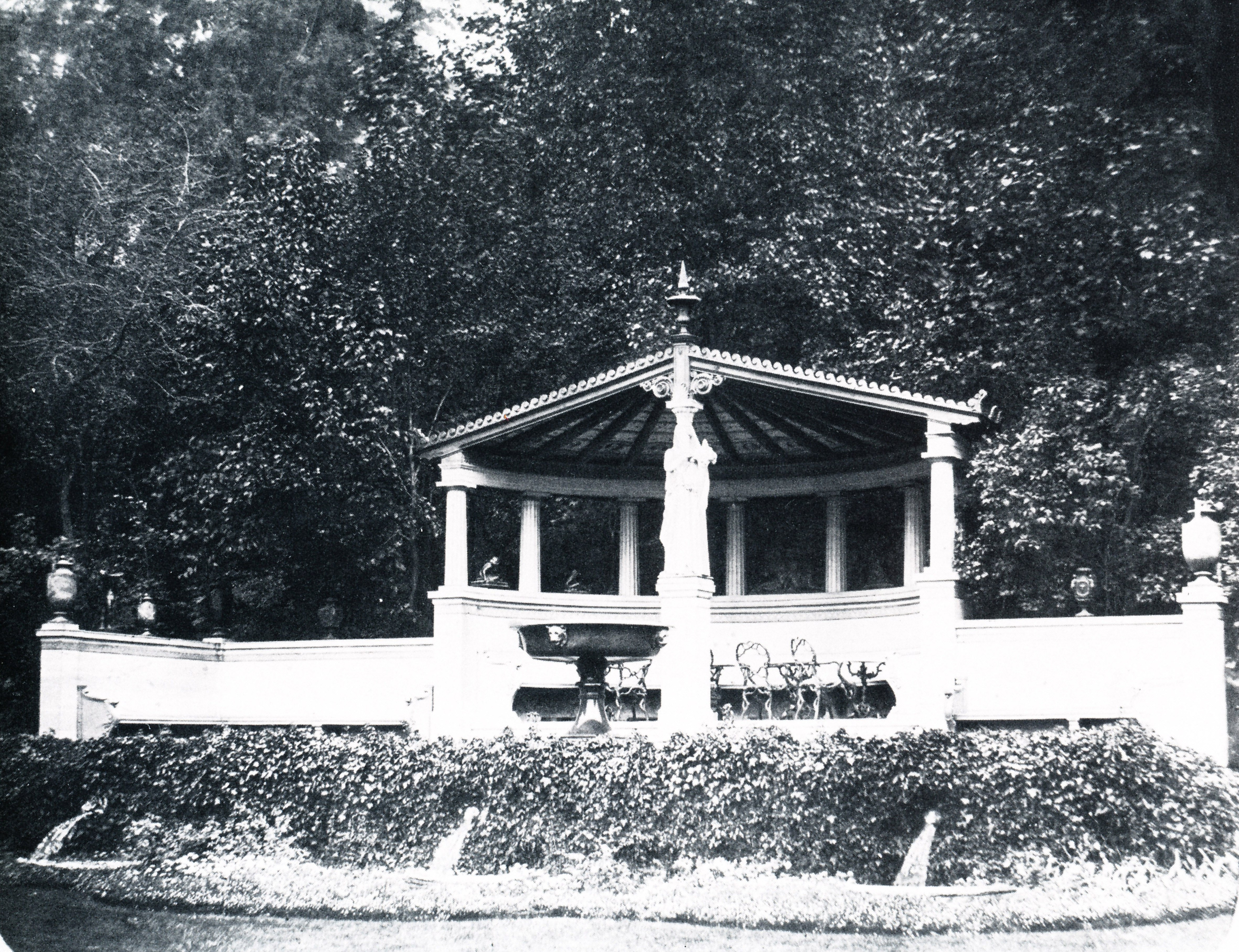 Ansicht des StibadiumsKlein-Glienicke, früheste Fotografie, späte 1850er Jahre